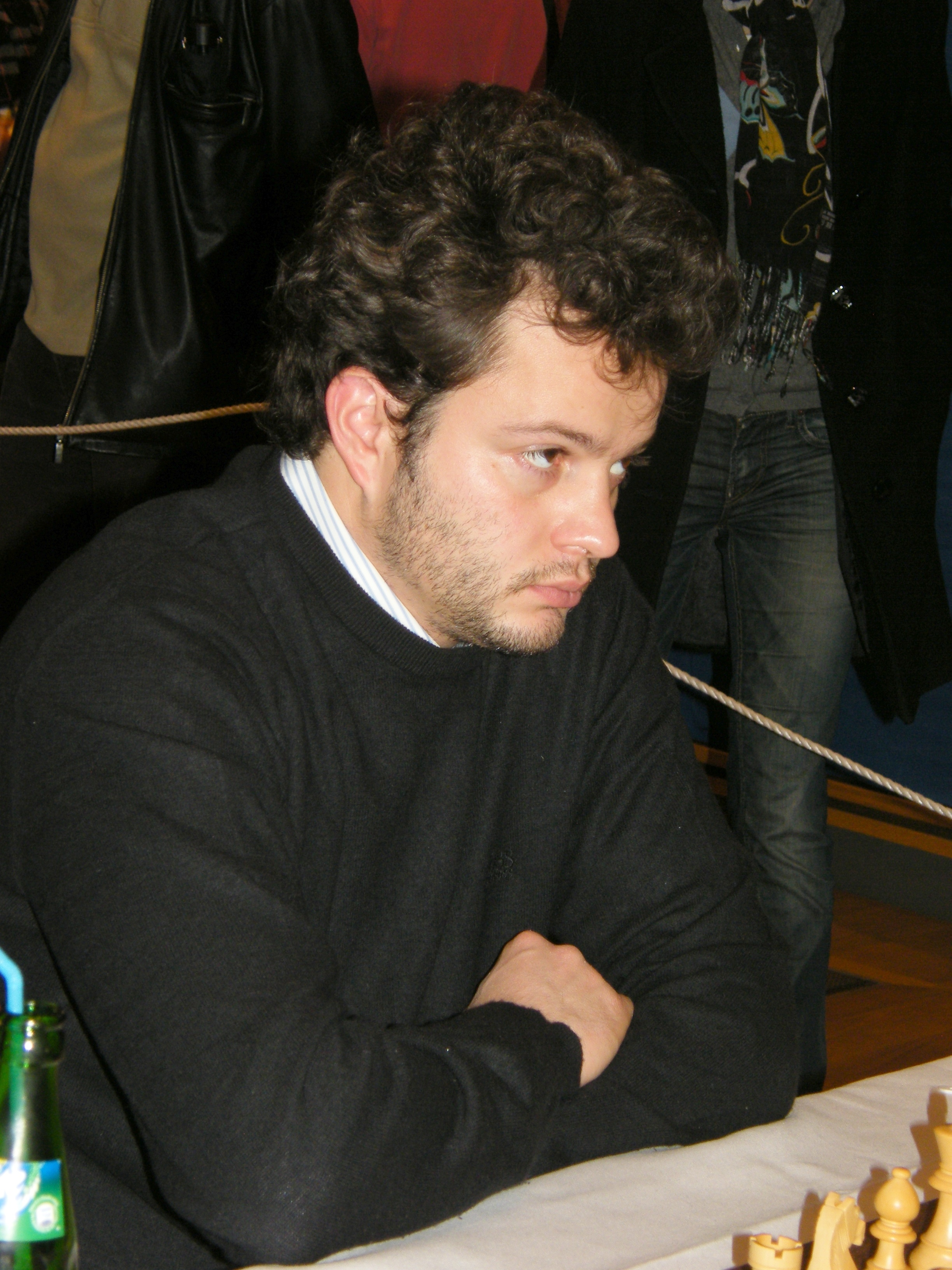 Etienne Bacrot bei der 38. Schacholympiade in Dresden 2008